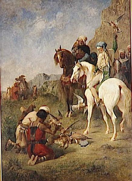 Chasse au faucon en Algerie ; La curée. Paris ; musée d'Orsay